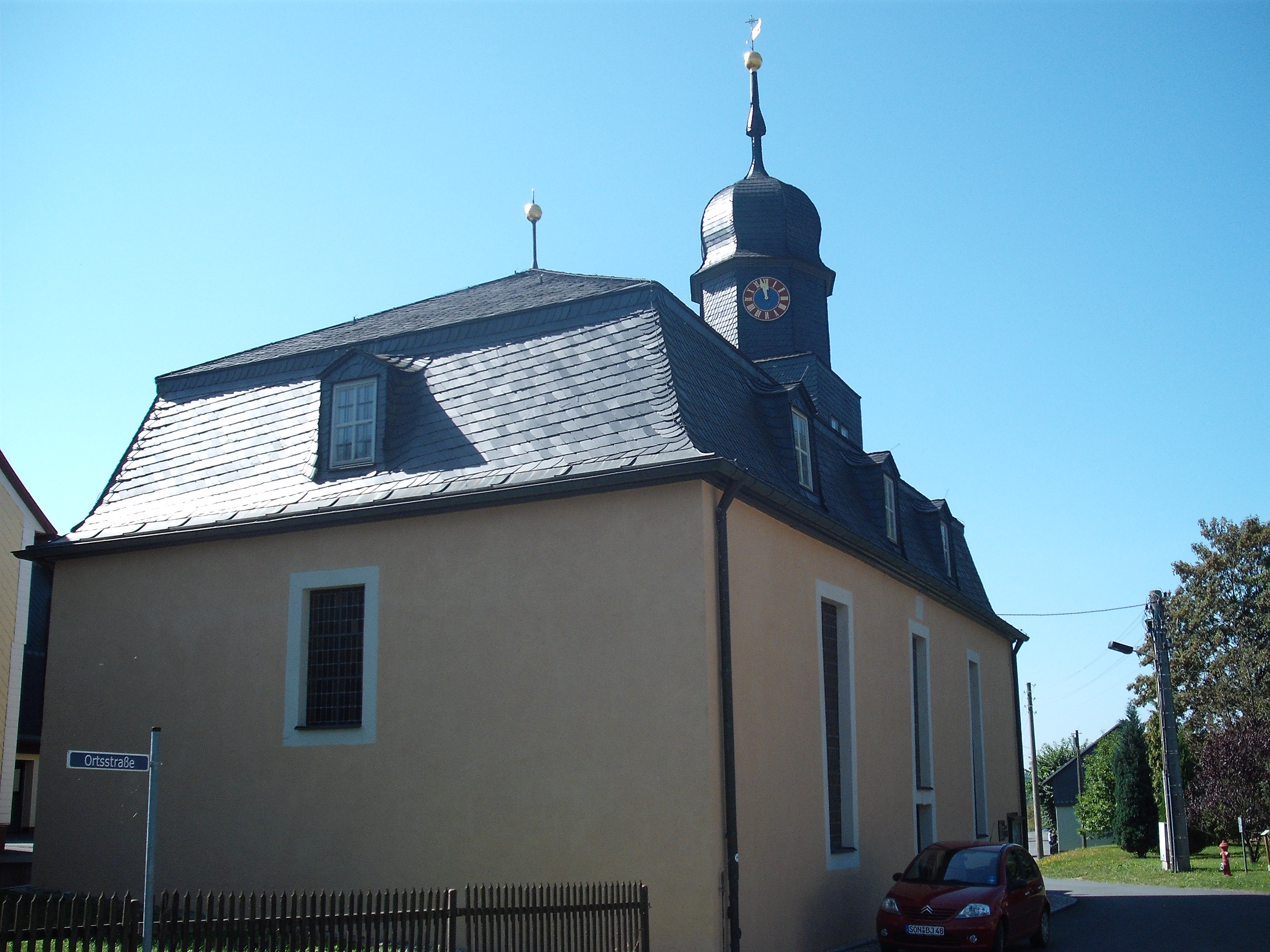 Nach fast zwei Jahrzehnten umfangreicher Restaurierung wurde die Matthäuskirche am 21.09.2008 neu geweiht.